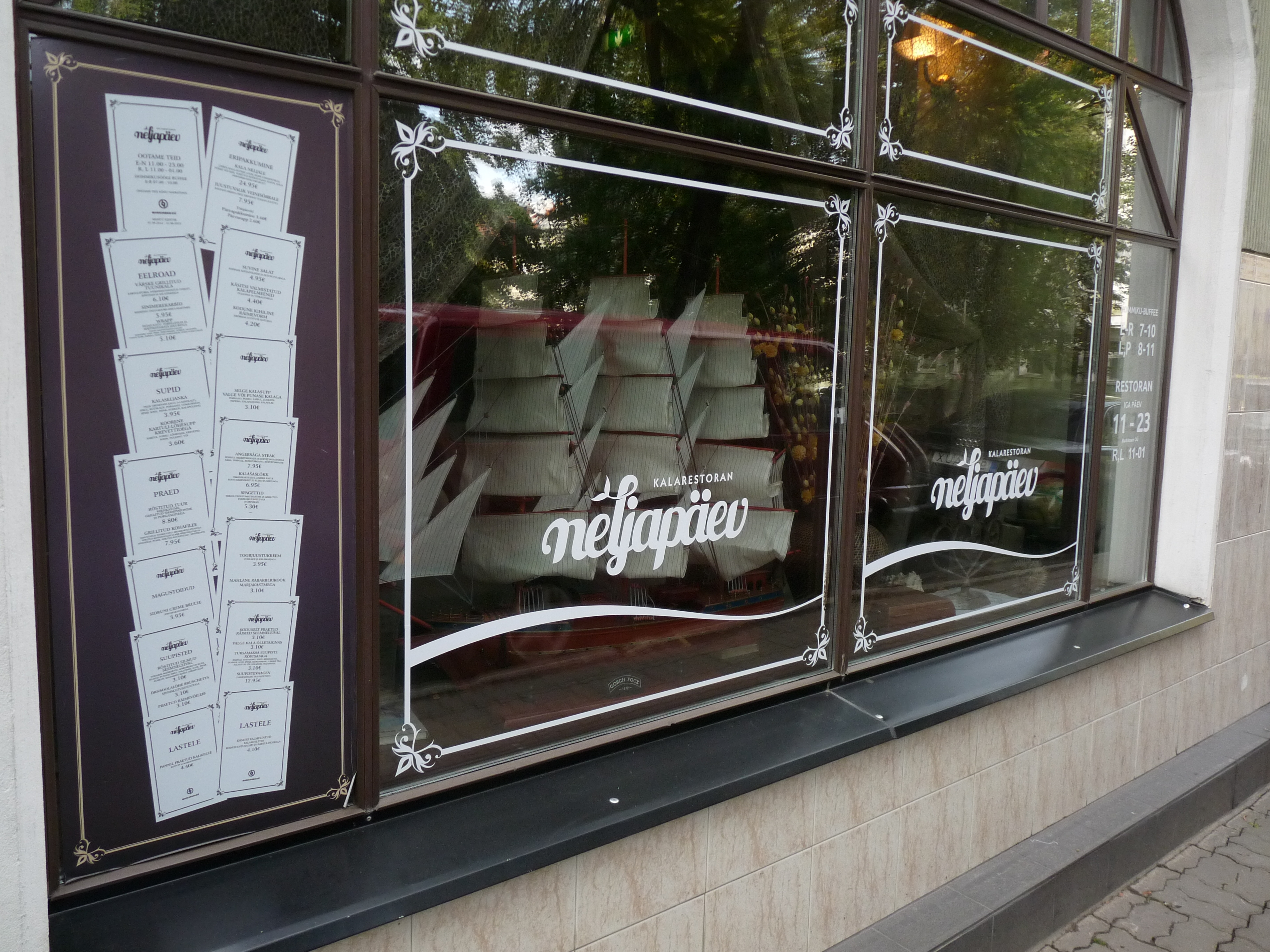 Barclay hotelli kalarestorani Neljapäev vaateaken menüü ja laevaga, 22. september 2012